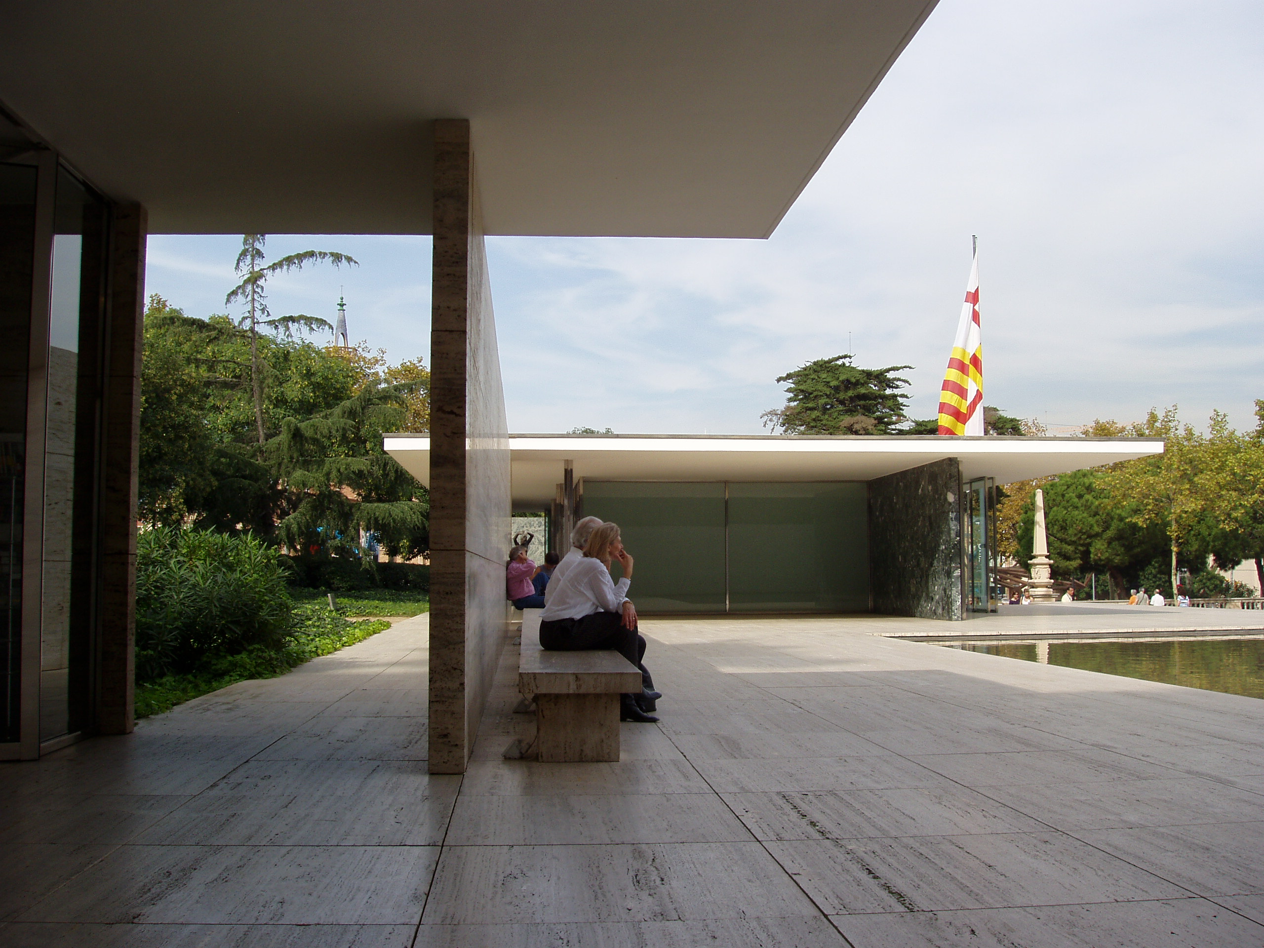 Pabellón de Barcelona en la Exposición Universal de Barcelona 1929 (reconstruido). Arquitecto Ludwig Mies van der Rohe.